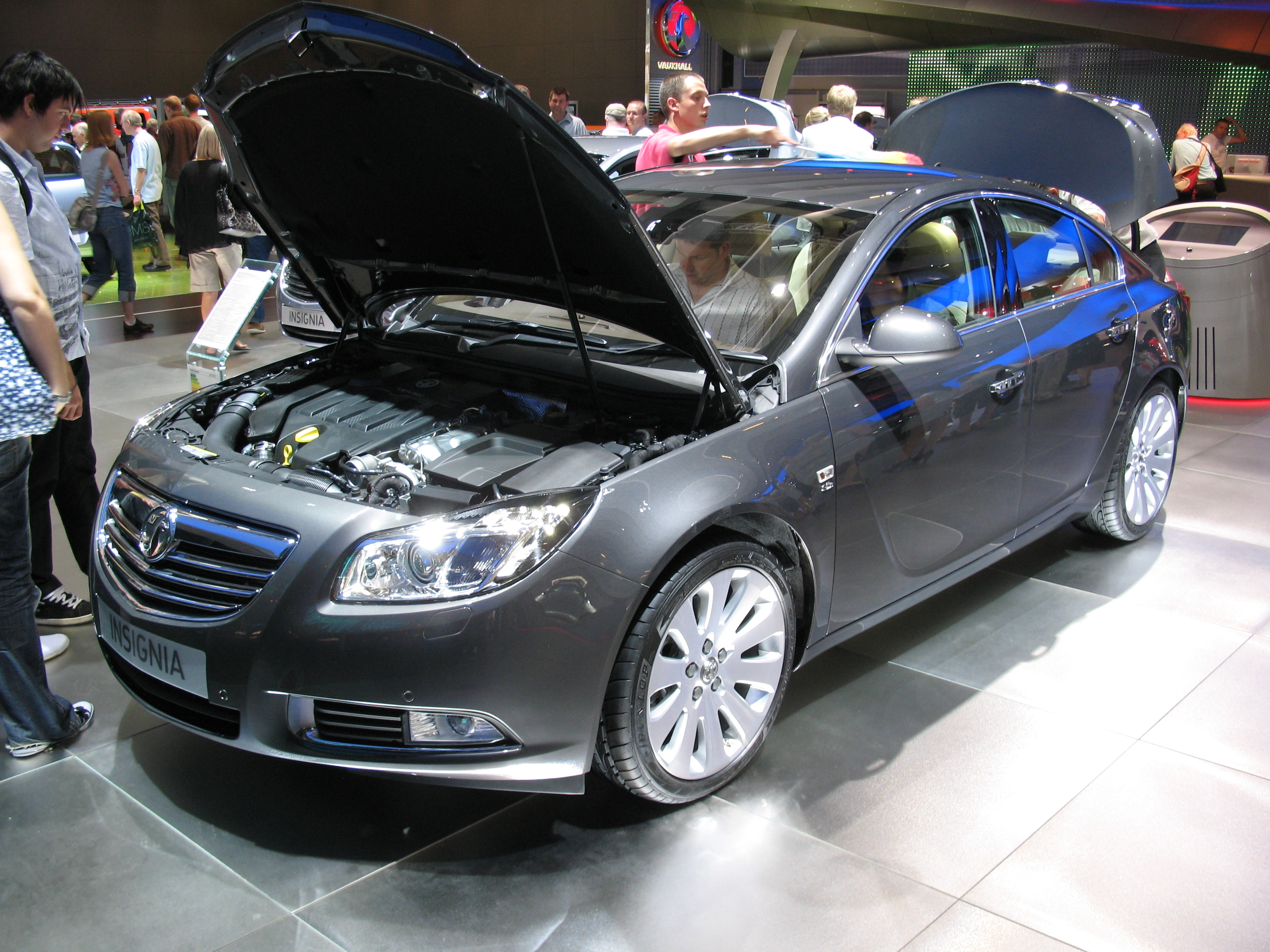 Opel/Vauxhall Insignia